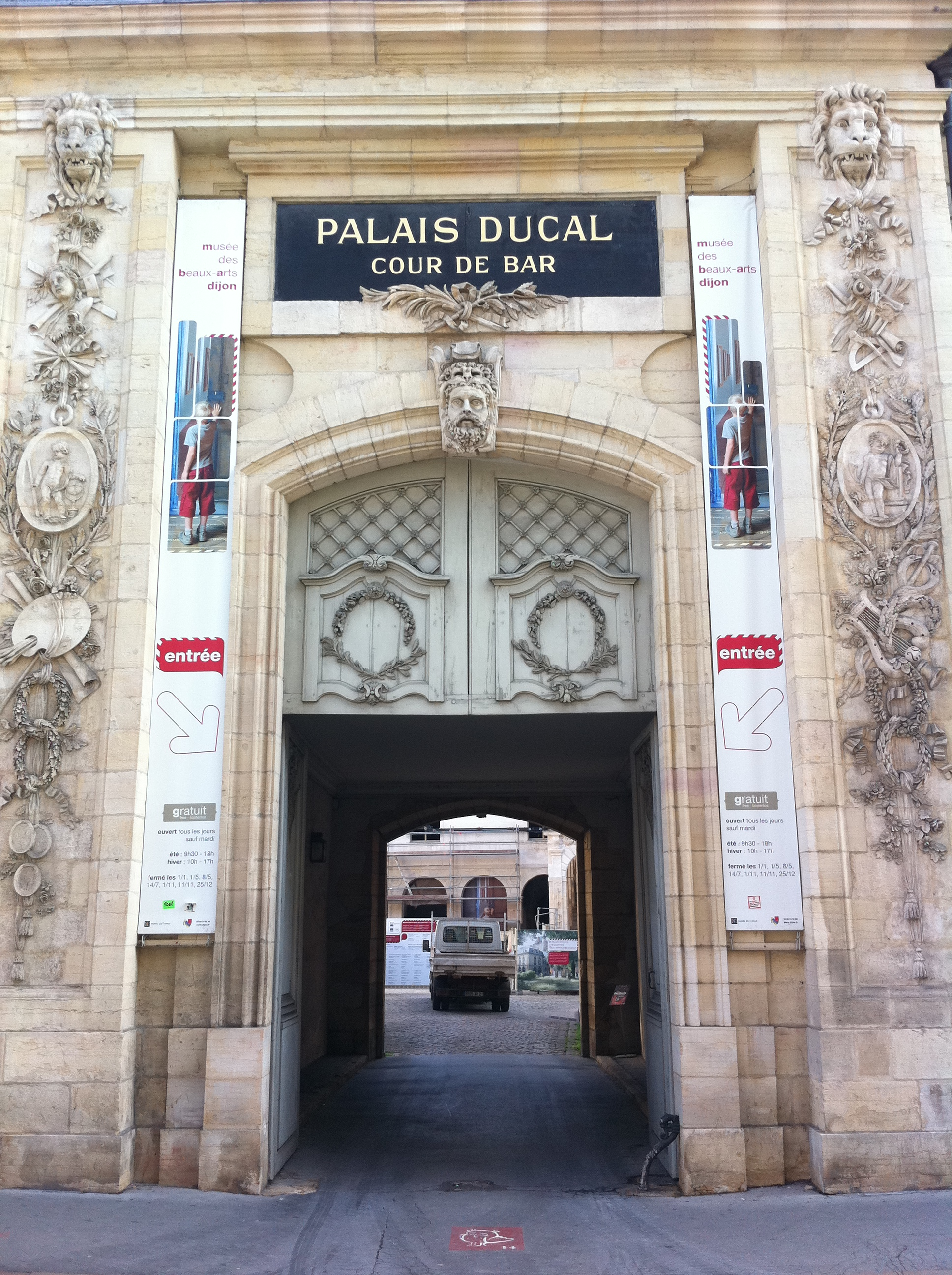 Entrée du Palais Ducal de Dijon, Cour de Bar